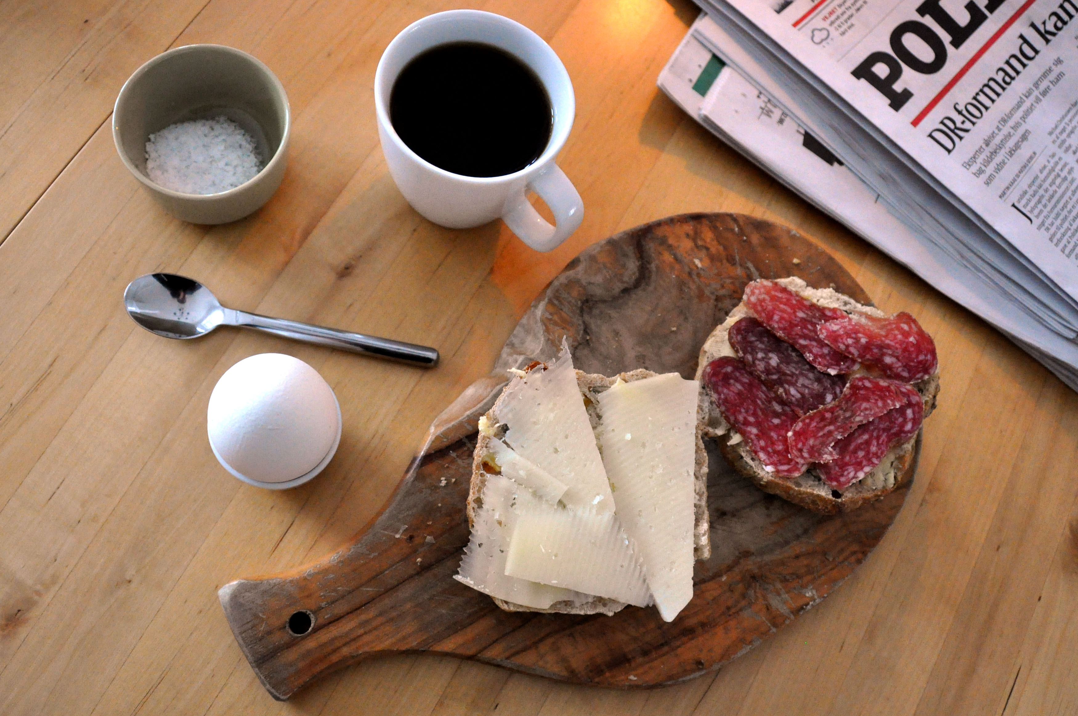 Kaffe, blødkogt æg og græskarkernestykke med pølse og manchego (Coffee, soft boiled eggs and pumpkin seed bread with sausage and manchego)